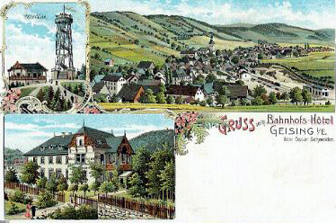 Geising Ansichtskarte Bahnhotel, 1907